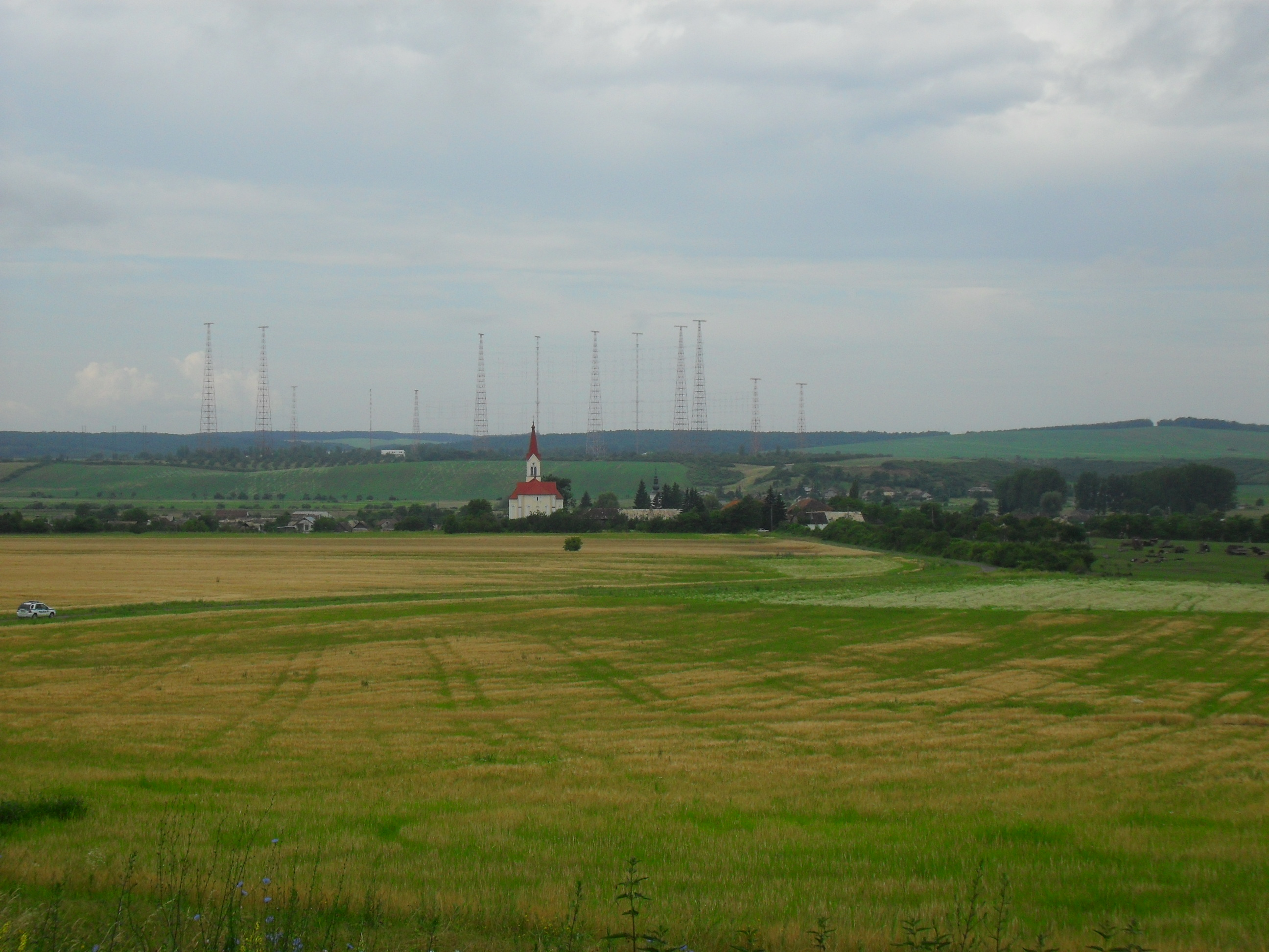 Uzapanyit - kilátás a falu felé a temetődombról